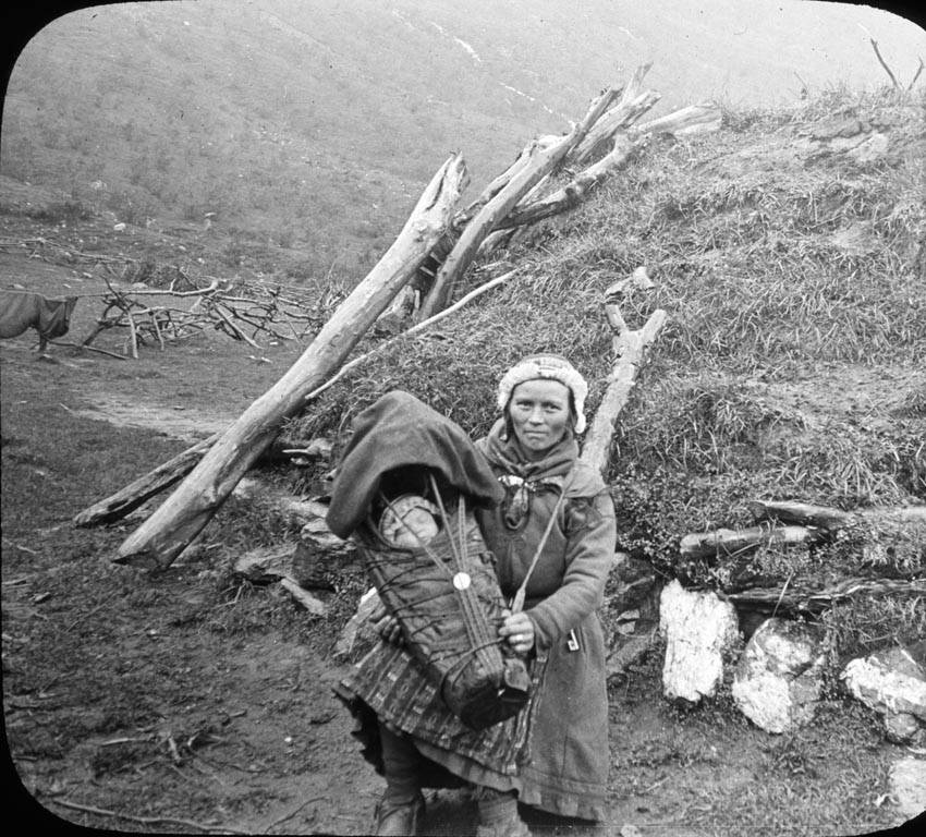 Lluís Llagostera i Pascual